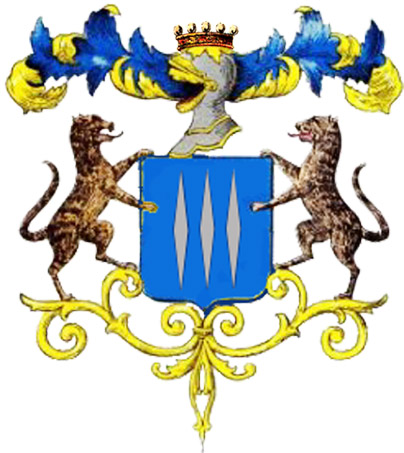 Autore Peppe64 - Immagine disegnata e assemblata con il programma di fotoritocco e disegno Photoscop CS2 seguendo le descrizioni dell'Emblema Palizzi negli stemmari e libri d'oro conservati alla Biblioteca Centrale di Roma, sezione Storia/Araldica. Lo stemma non è un marchio registrato